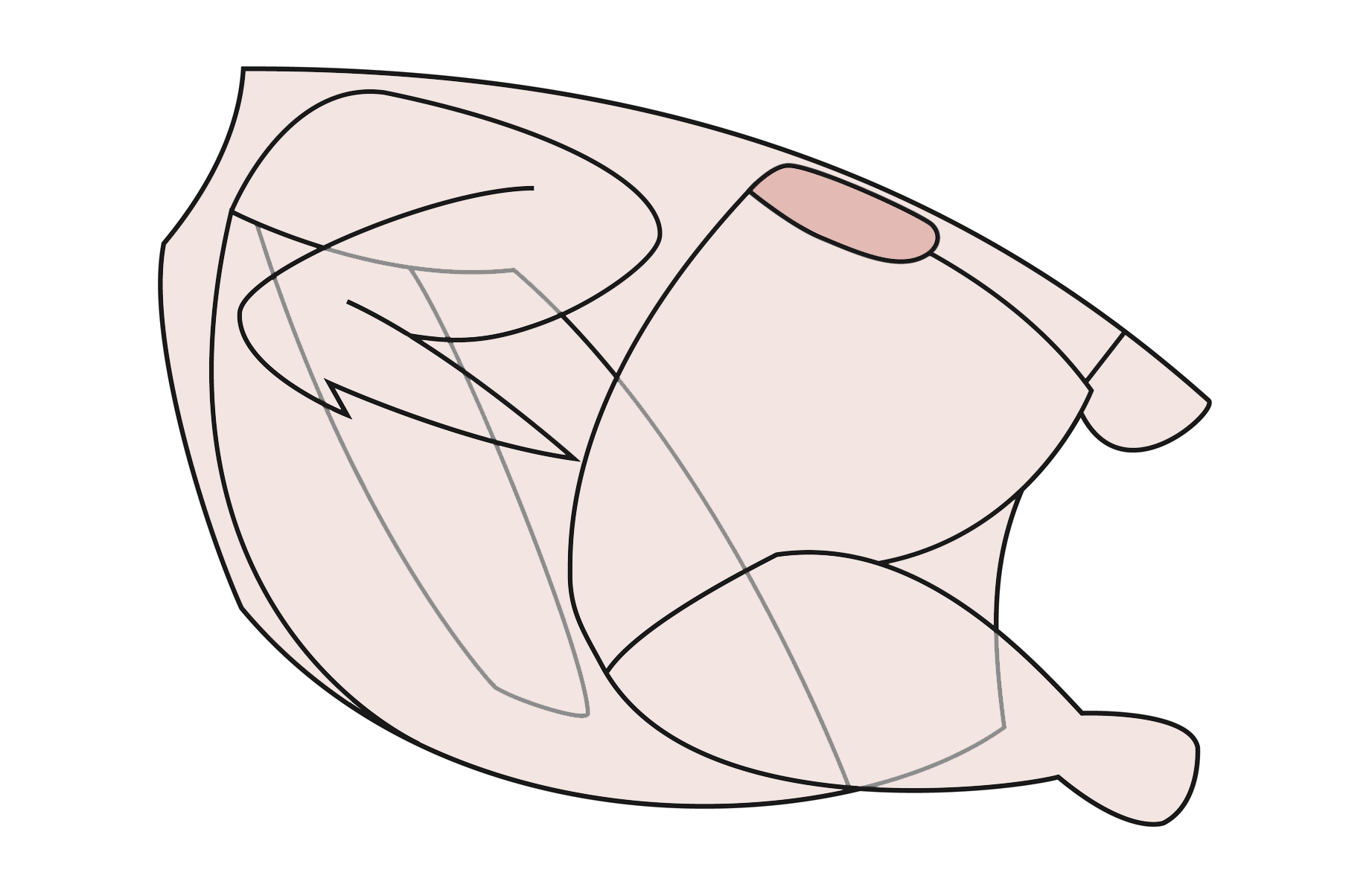 Pfaffenschnittchen, chicken oyster, sot-l’y-laisse